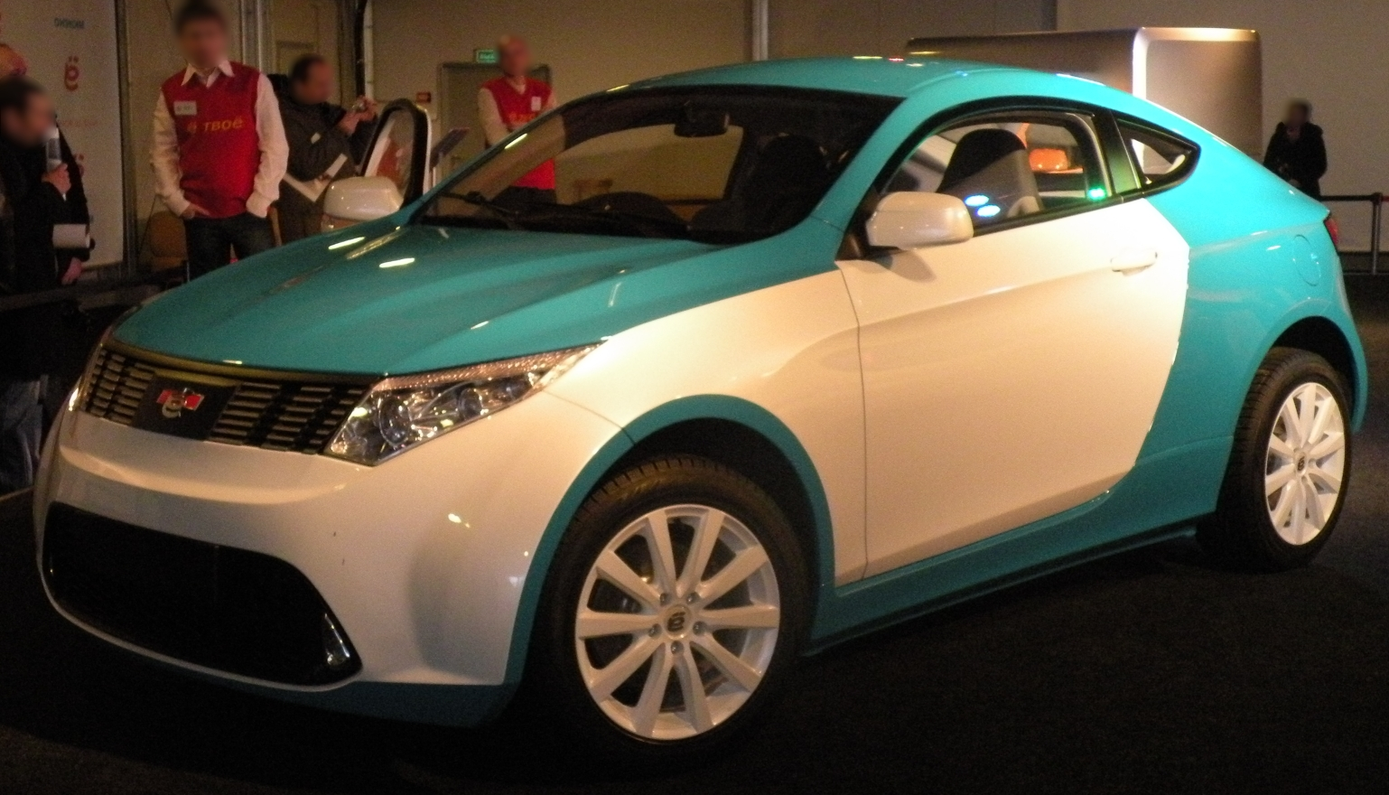 Ё-кросс-купе